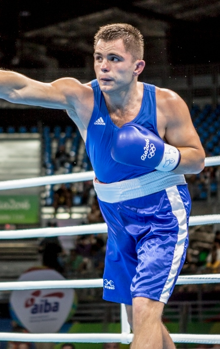 Day 3